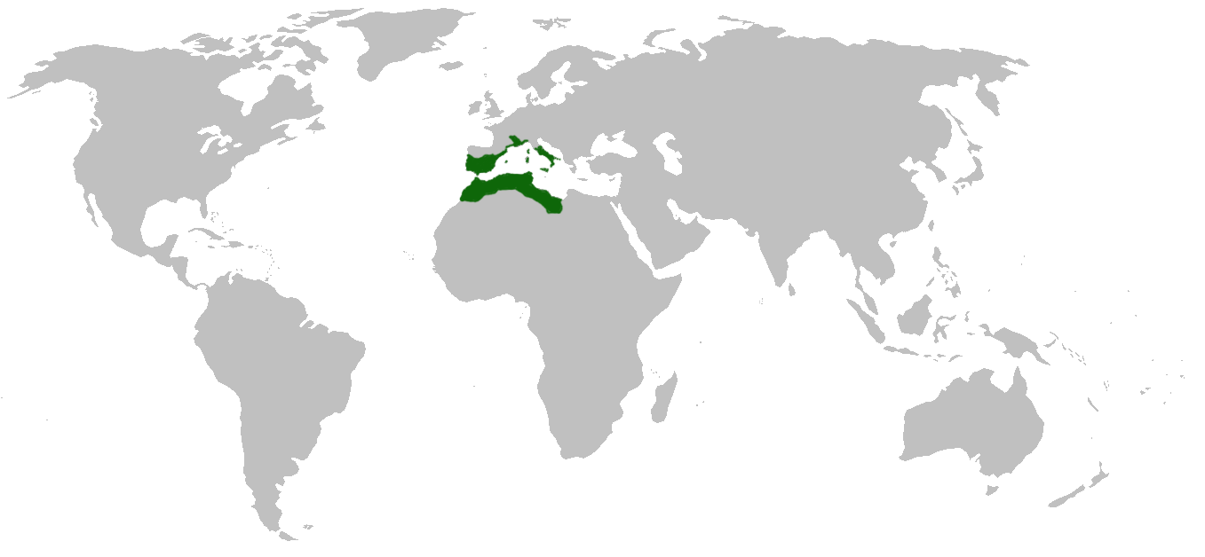 Mapa de distribución de Quercus faginea